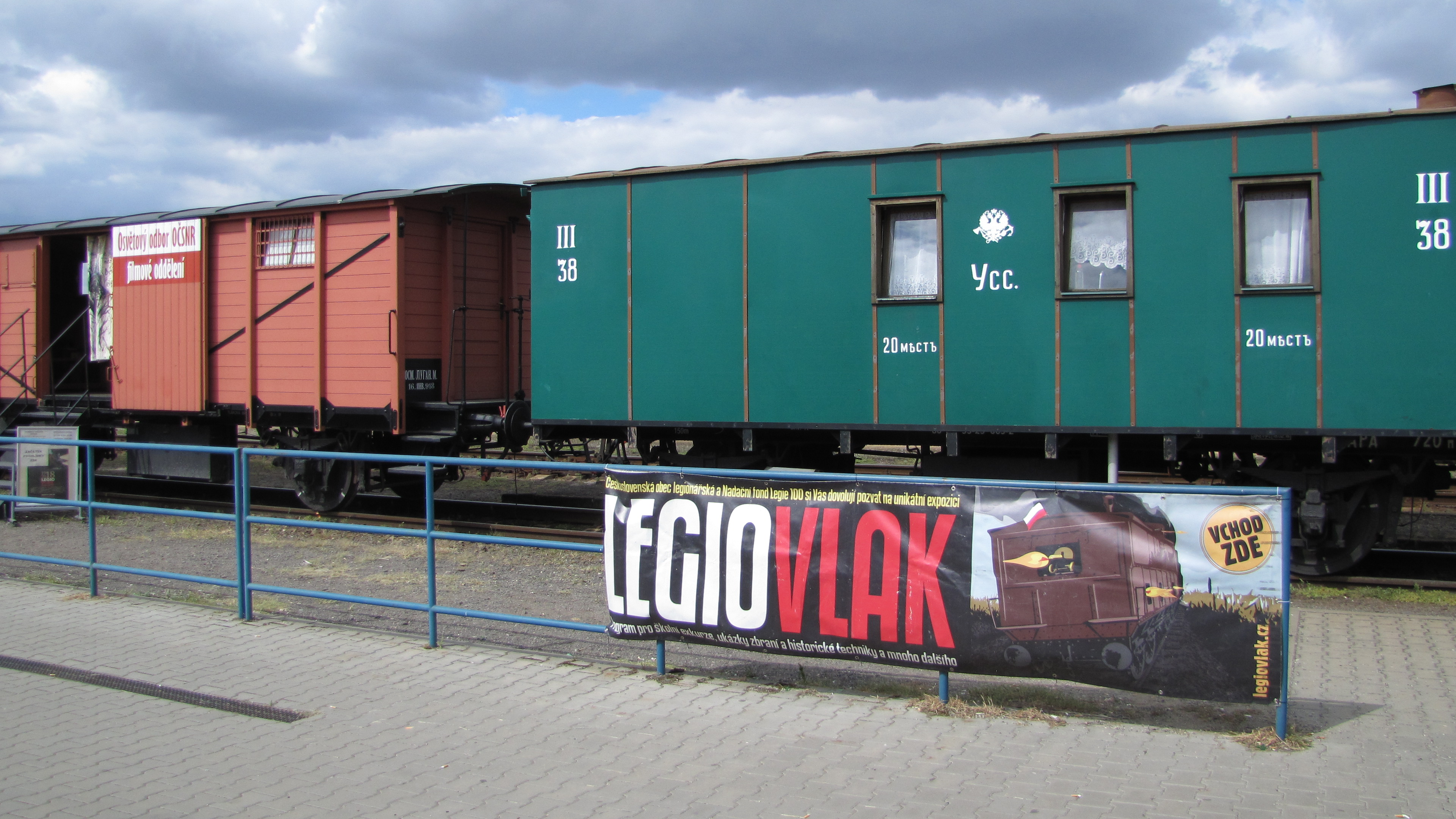 Putovní muzeum Legiovlak na železniční stanici Kyjov